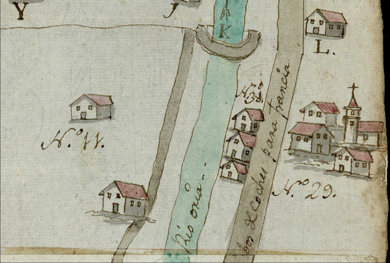 Zubimusu zubiaren ingurua 1782